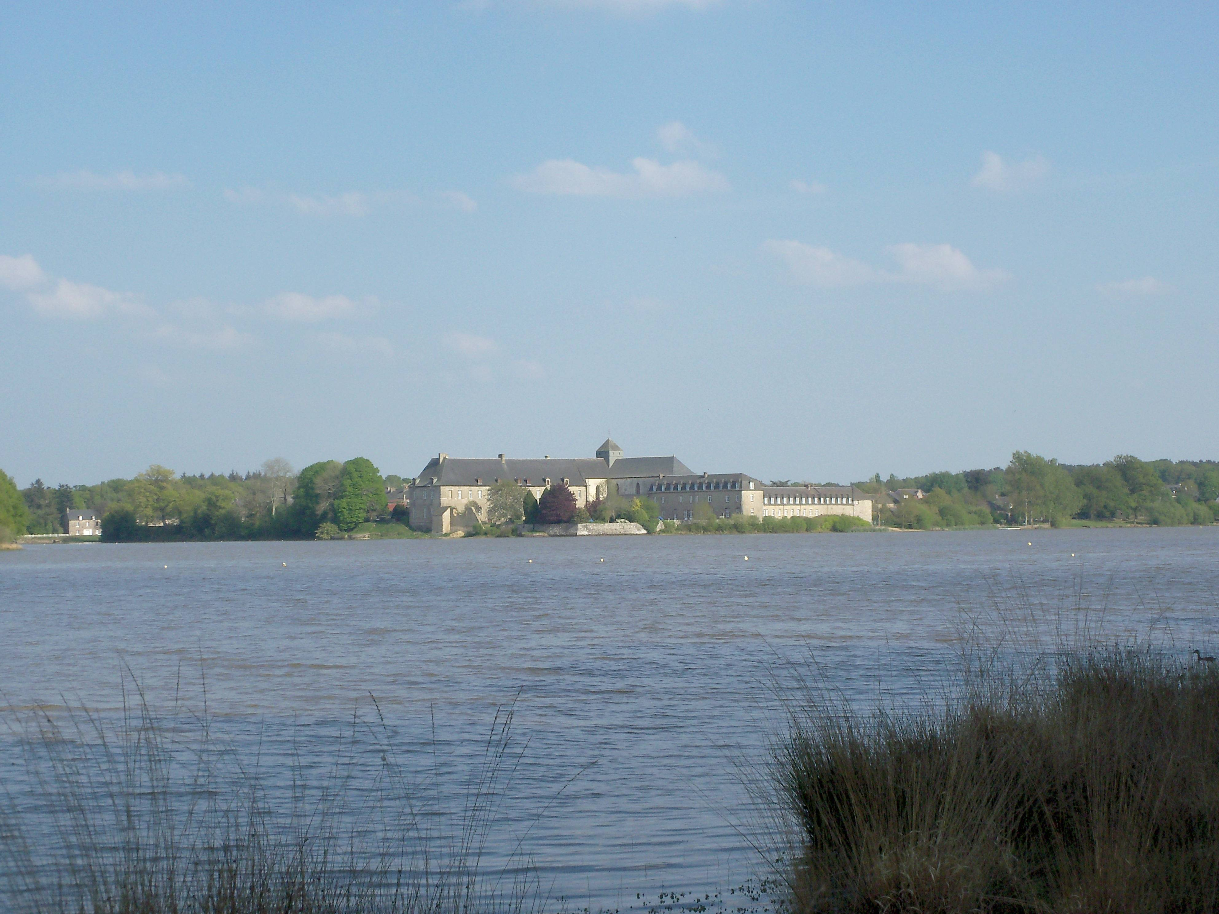 Etang de Paimpont et arrière des batiments de l'Abbaye de Paimpont en Ille-et-Vilaine, France en avril 2011. Plan large d'une autre photo téléchargée.